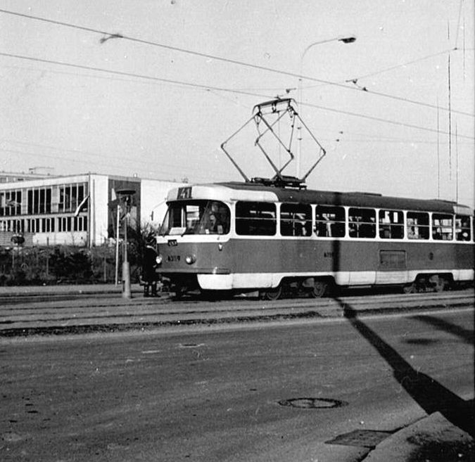 Praha, tramvaj T3 ev. č. 6359 na zvláštní lince 41 (pravděp. Komarovova ulice - dnes Švehlova - a zastávka Sídliště Zahradní Město nebo Na Groši).